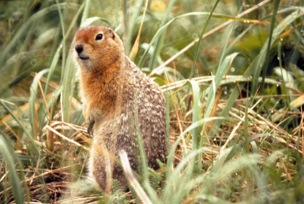 Американский суслик (Spermophilus parryii).